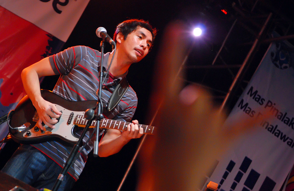 Rico Blanco performing at Ayala Parking lot